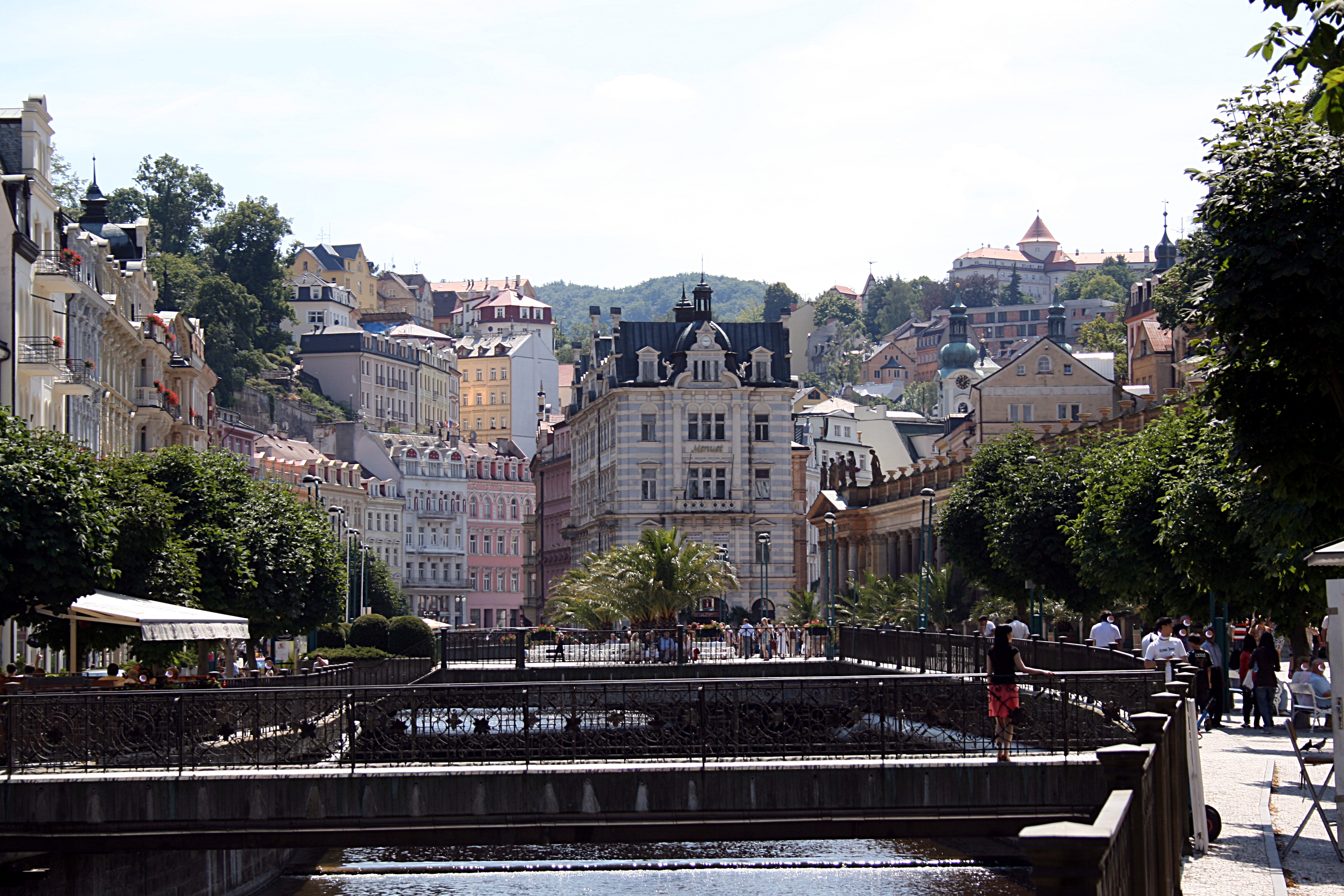 Karlsbad